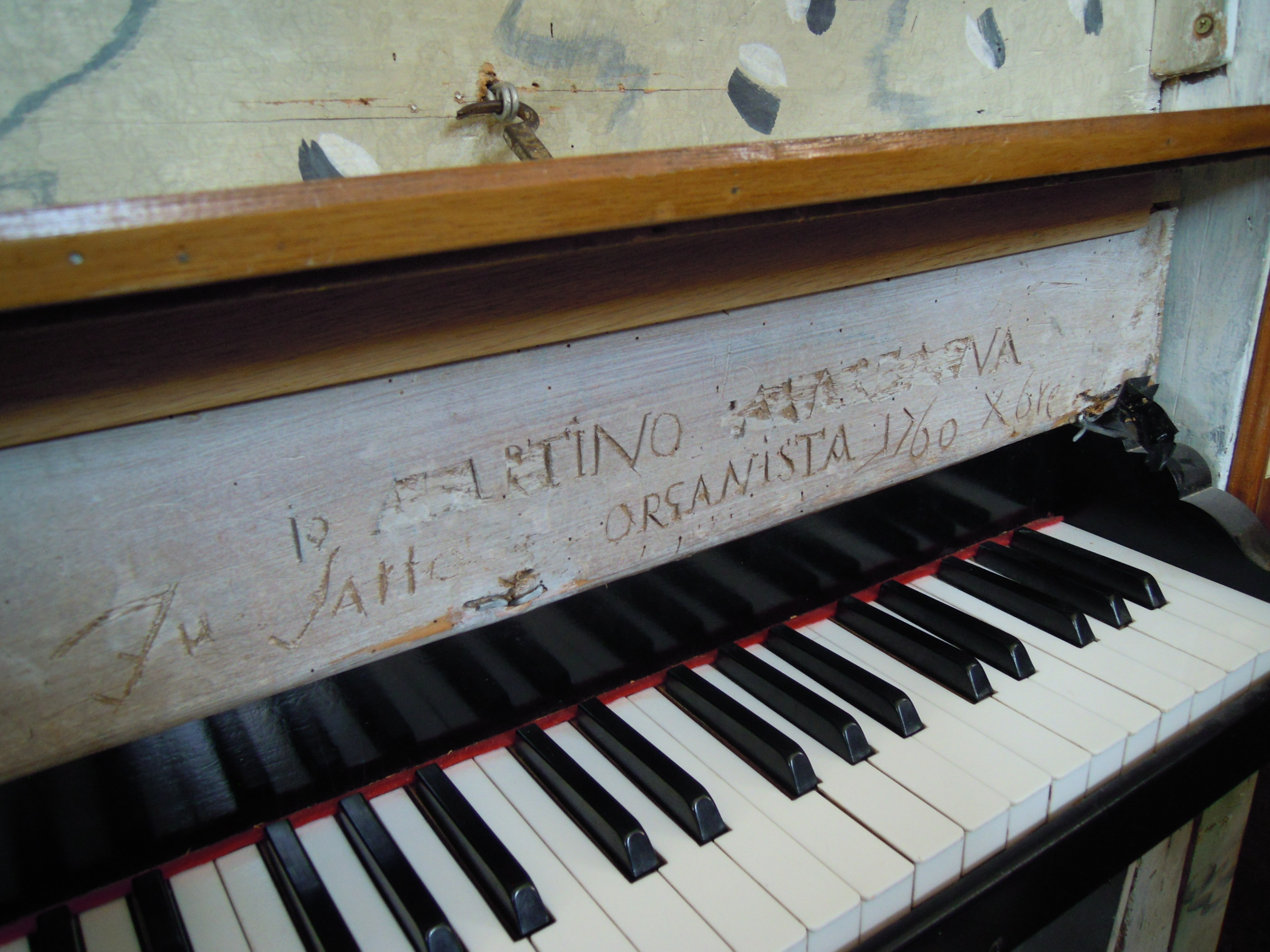 La tastiera dell'organo del Santuario della Santissima Annunziata in Gaeta